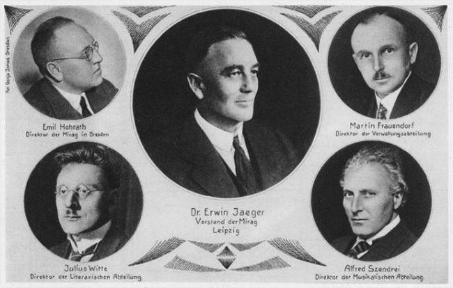 Das Direktorim der MIRAG (Mitteldeutsche Rundfunk AG)